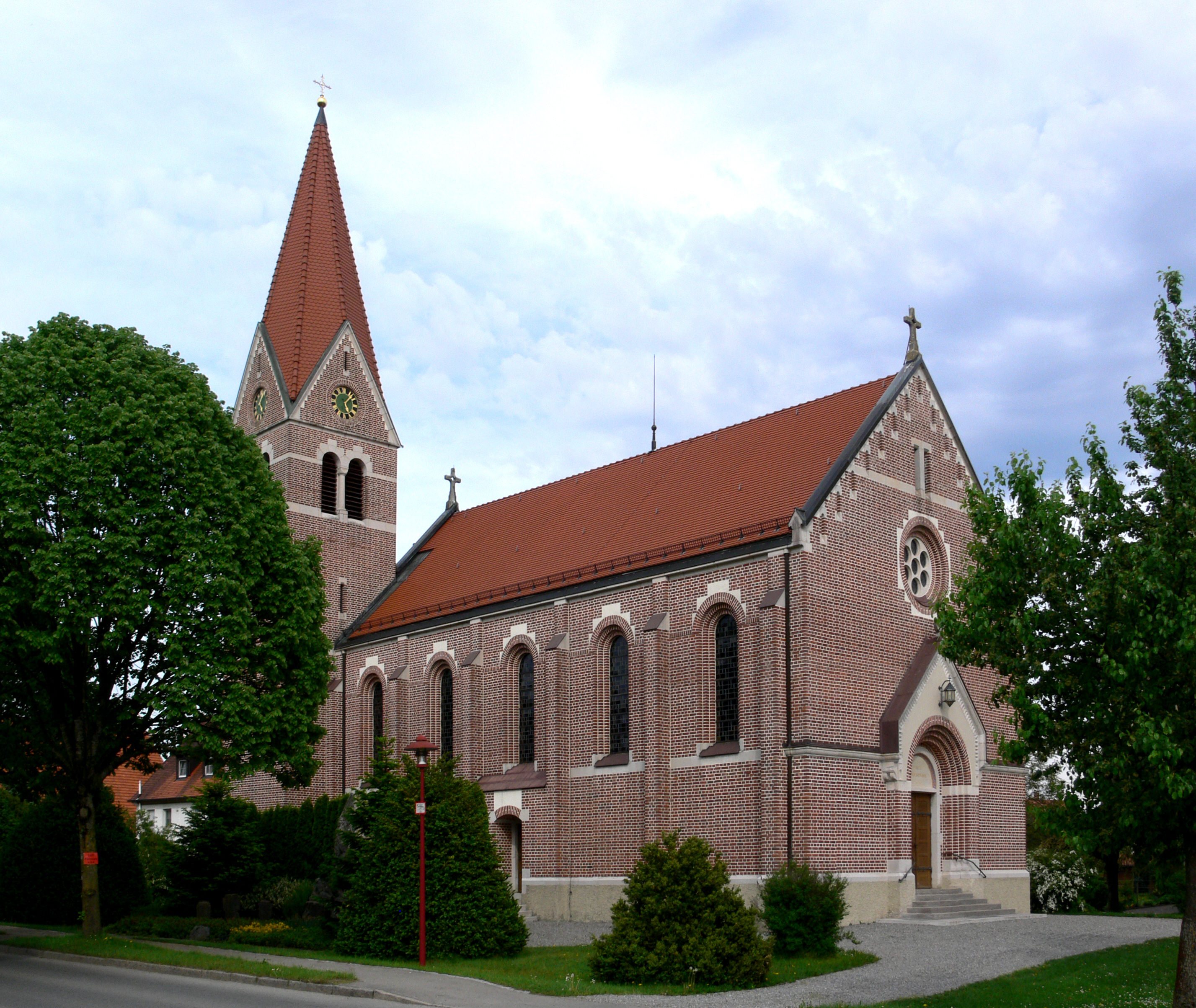 Pfarrkirche St. Wendelin, Oberdorf, Gemeinde Langenargen